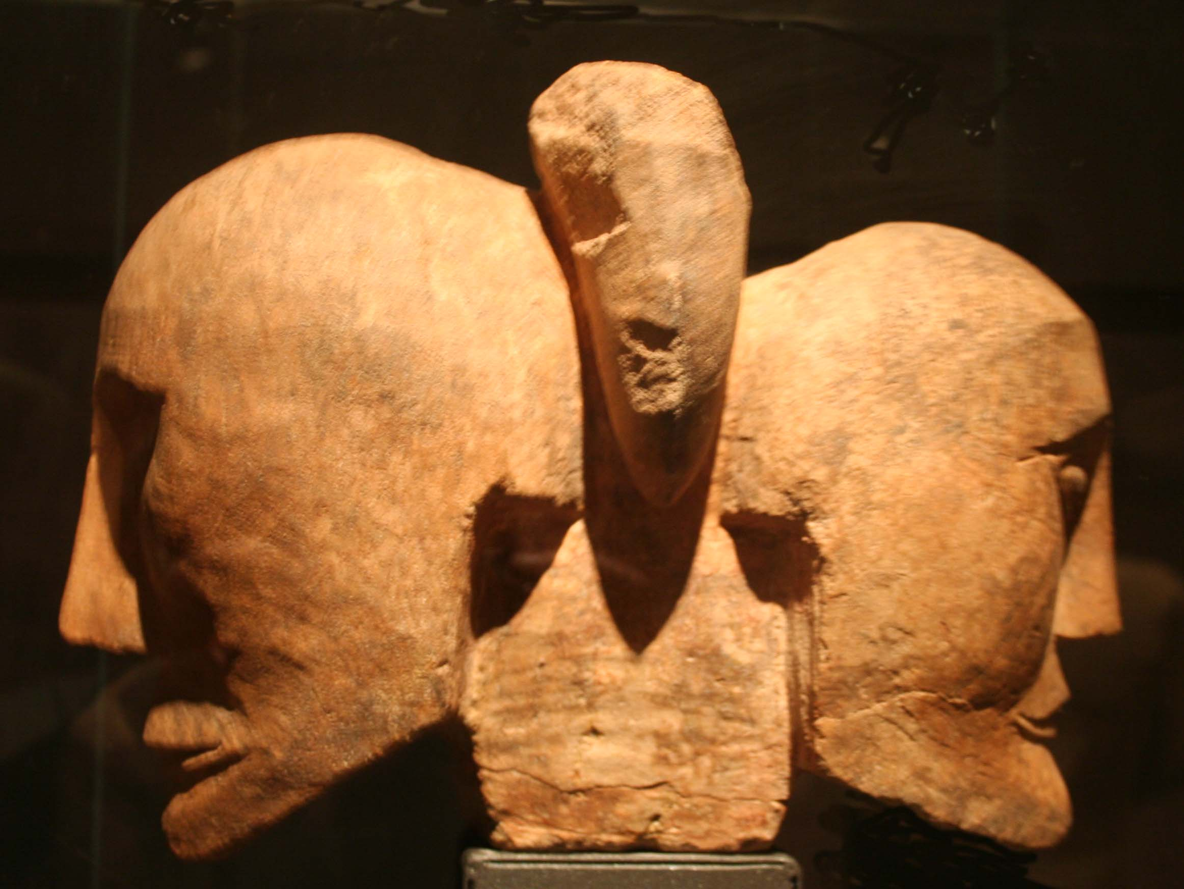 Roquepertuse (Bouches-du-Rhône) têtes adossées à la façon des Hermés grecs, sculpture celto-ligure du IIIe siècle av. J.C., à la réunion des deux têtes se trouve un appendice qui serait le reste d'une coiffure, hauteur=0.39 longueur=0.19 mètre. Musée d'archéologie méditerranéenne de la vieille Charité à Marseille.